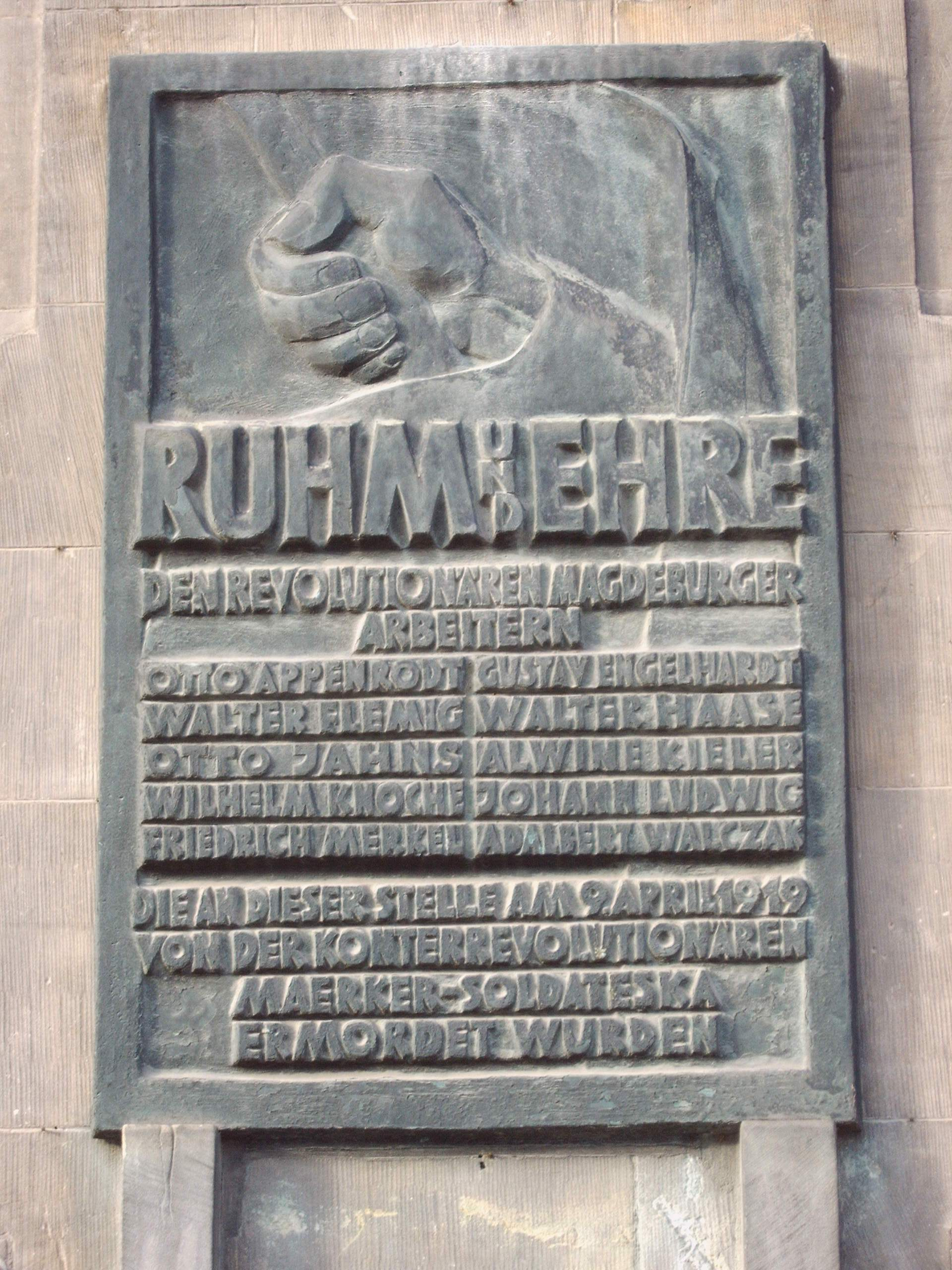 Gedenktafel an Tote von 1919, Breiter Weg Magdeburg Bild aufgenommen am 6.12.2005 von Olaf2